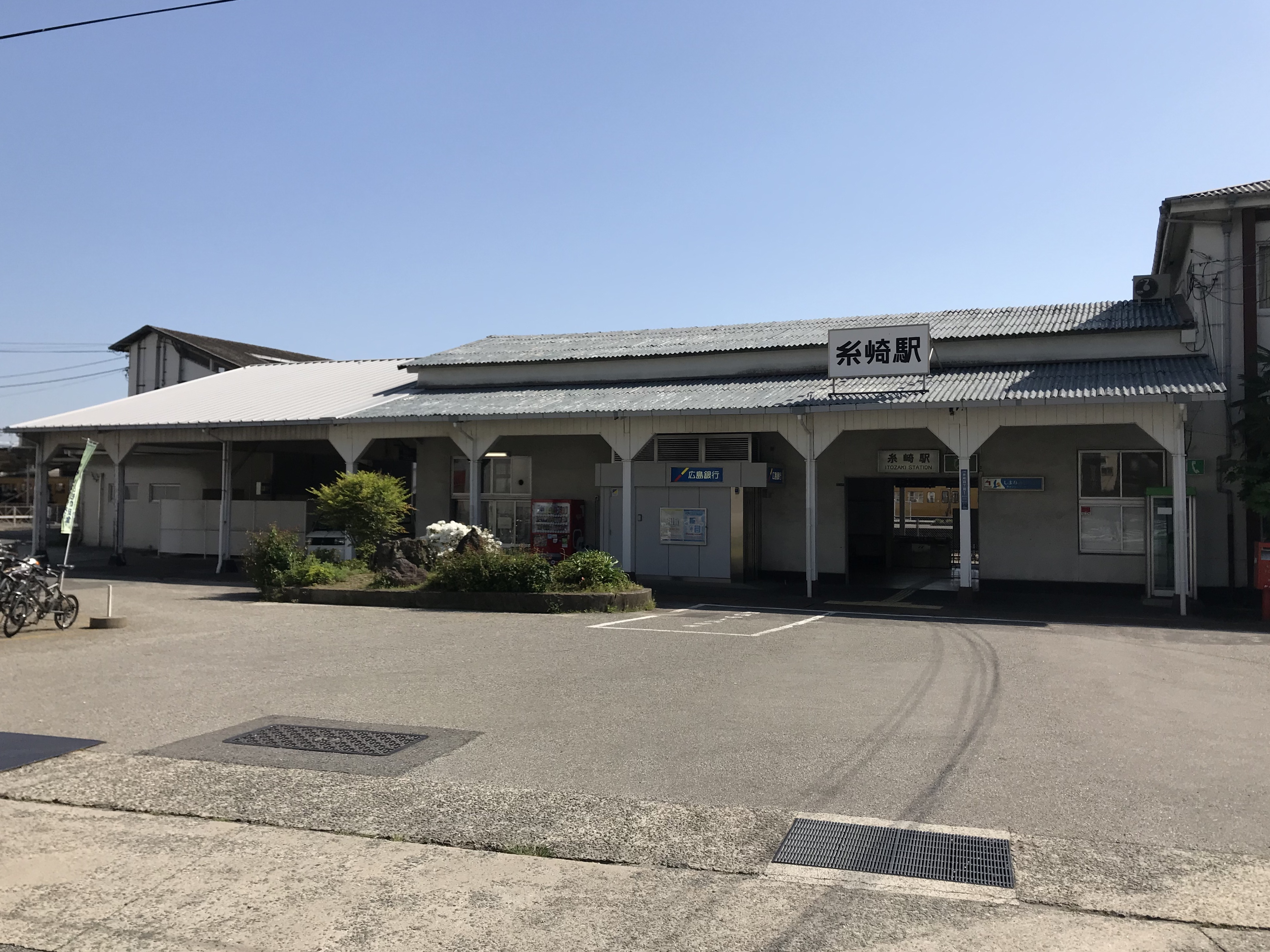 糸崎駅の駅舎